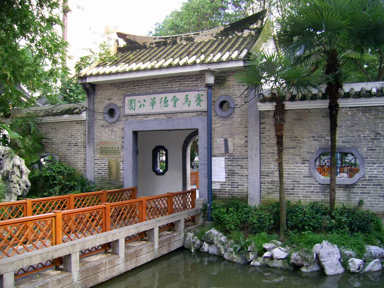 中文（香港）: 荃灣賽馬會德華公園